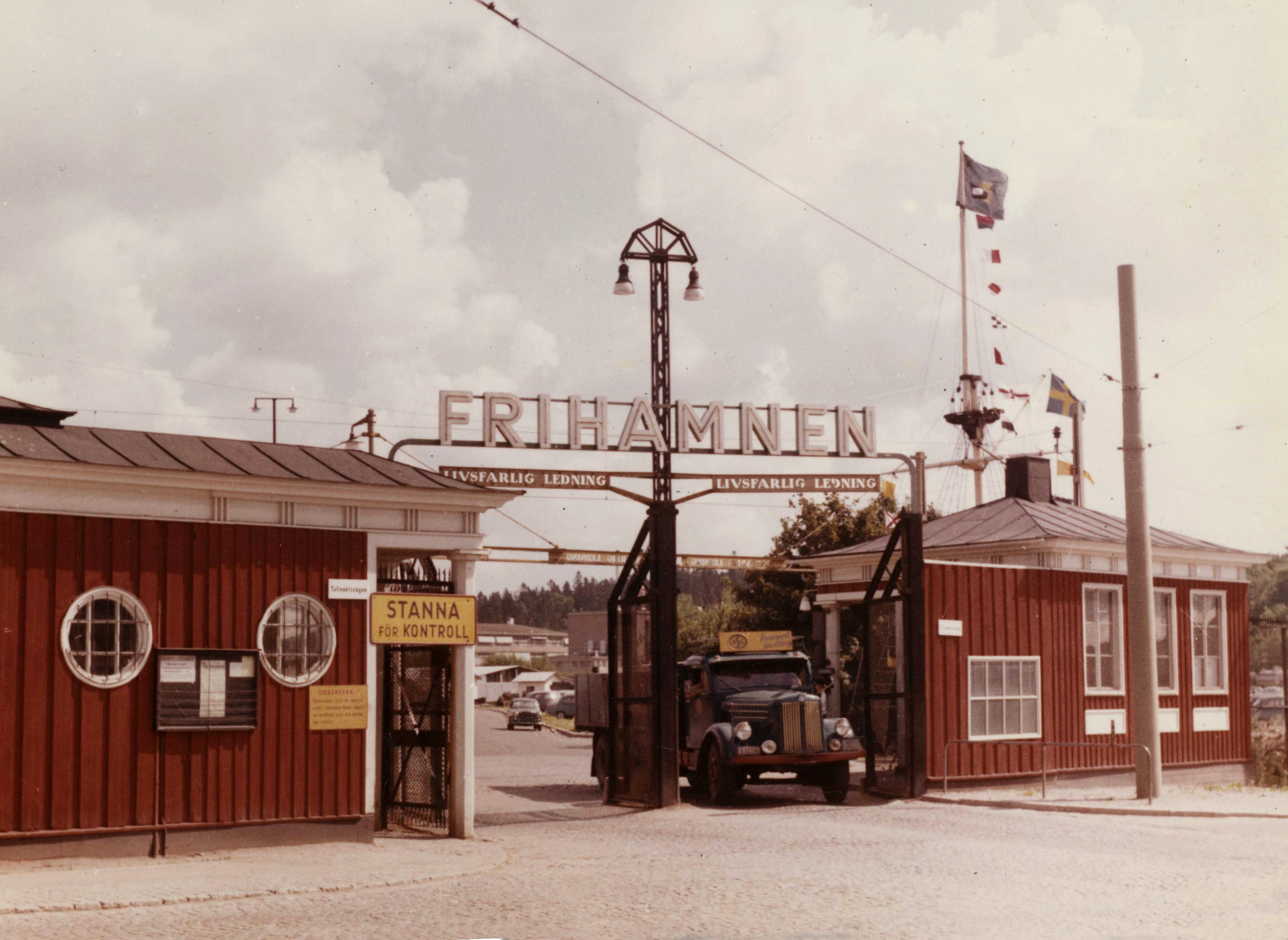 Porten och kontrollen till Stockholms frihamn 1958